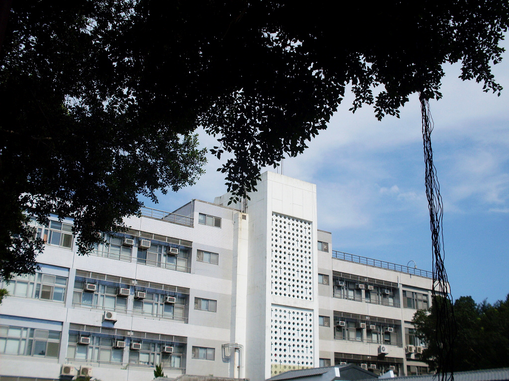 輔大社科院